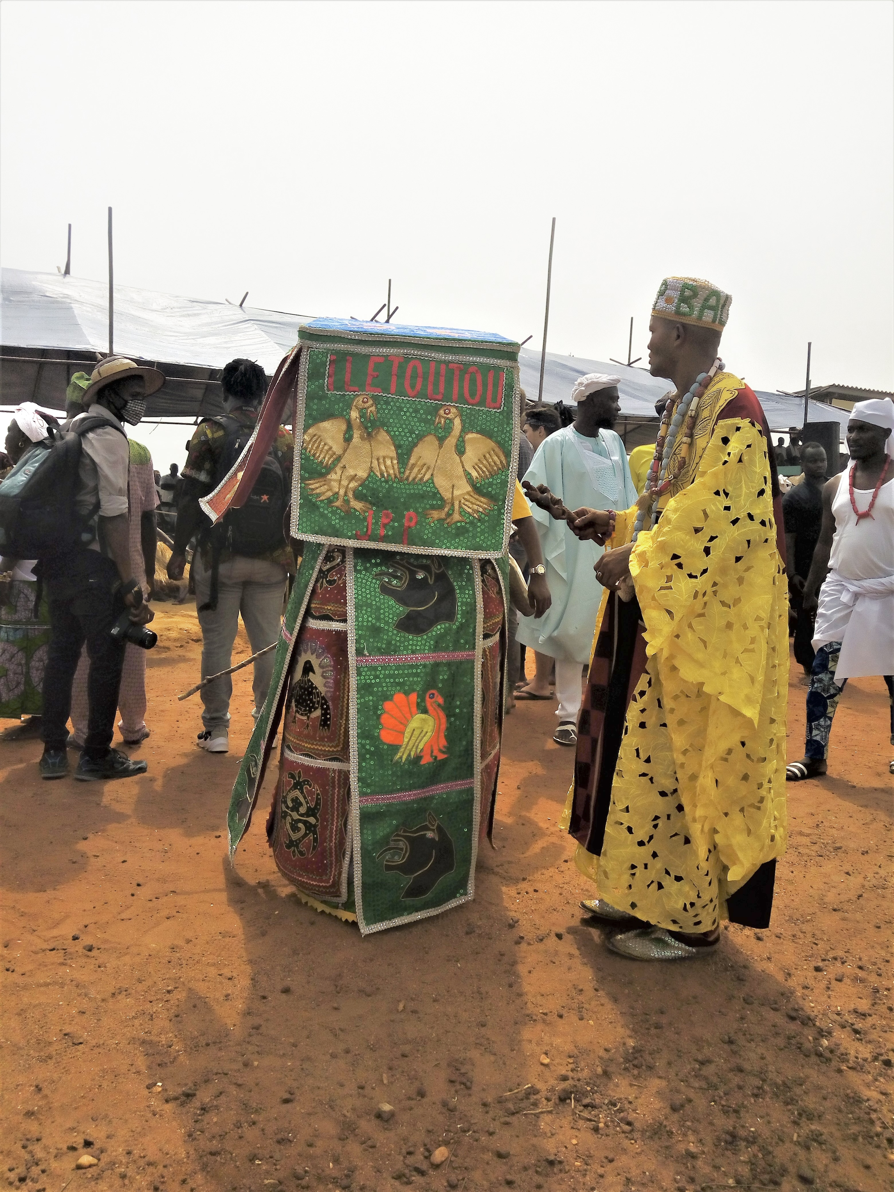 Egun communicant avec son prêtre lors de le fête du 10 janvier 2020 a Grand Popo au Bénin This photo has been taken in the country: Benin